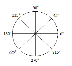 Constellatie Diagram